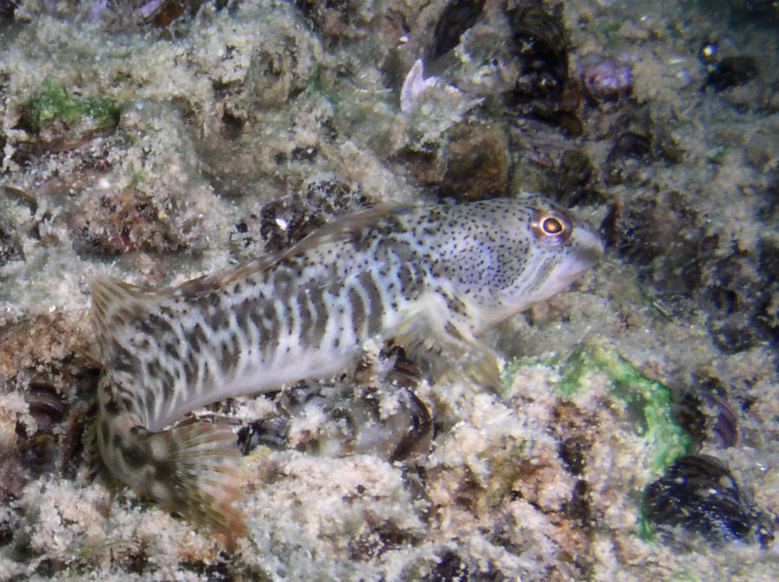 Blennie d'eau douce - Salaria fluviatilis